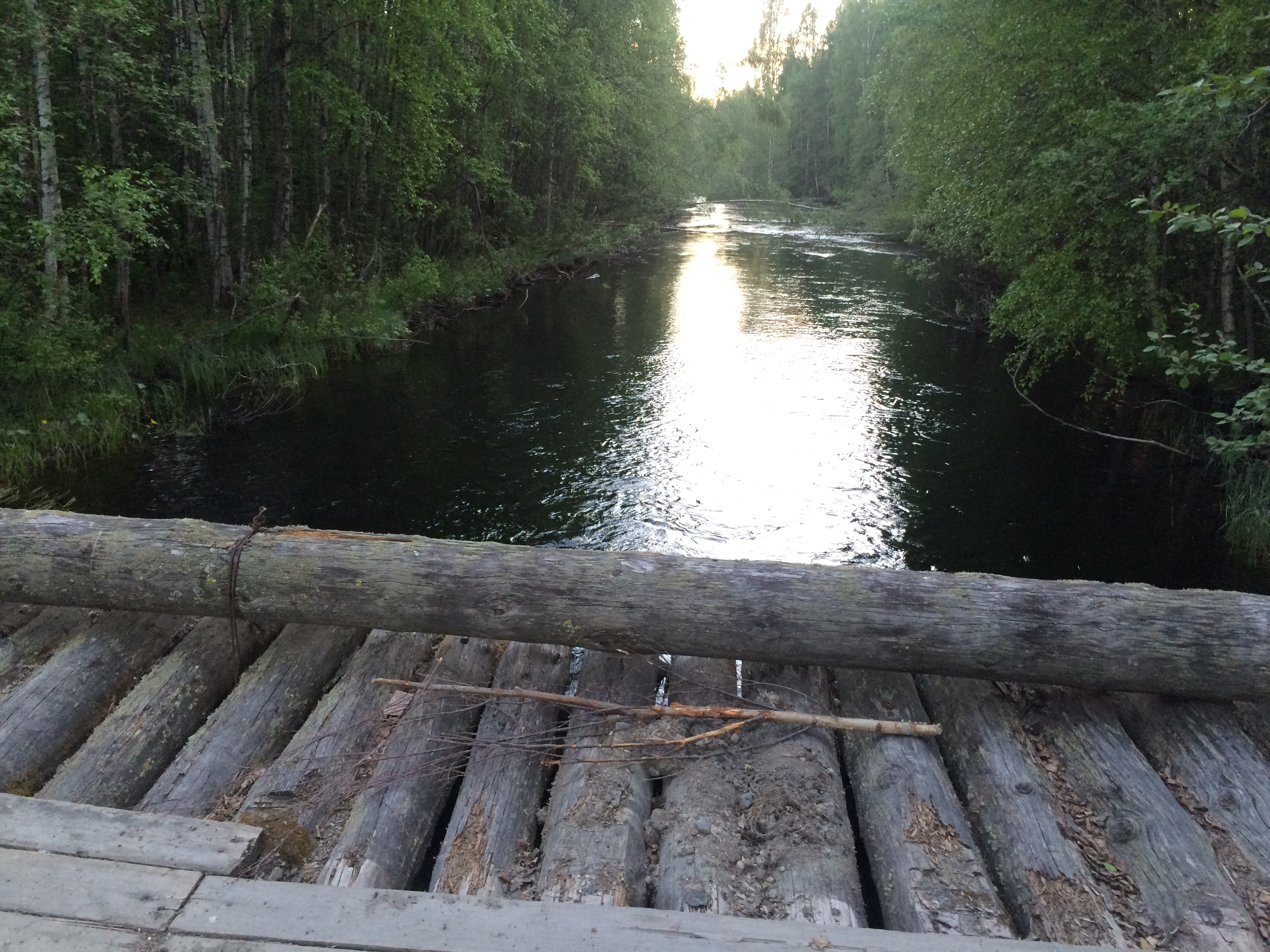 р. Саркайоки ниже озера Саокаярви.